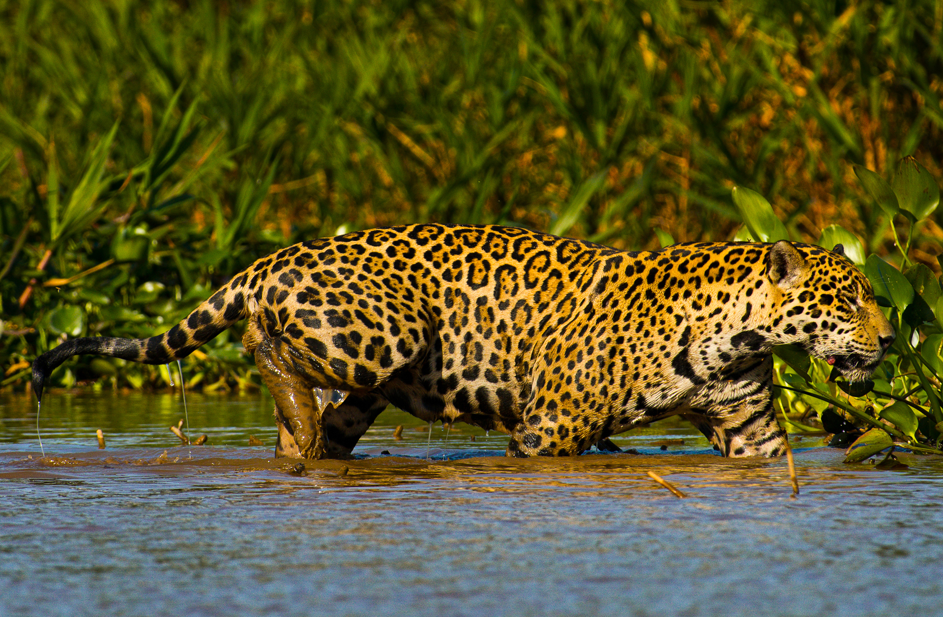 Onça-pintada macho caminhando dentro d'água em corixo.